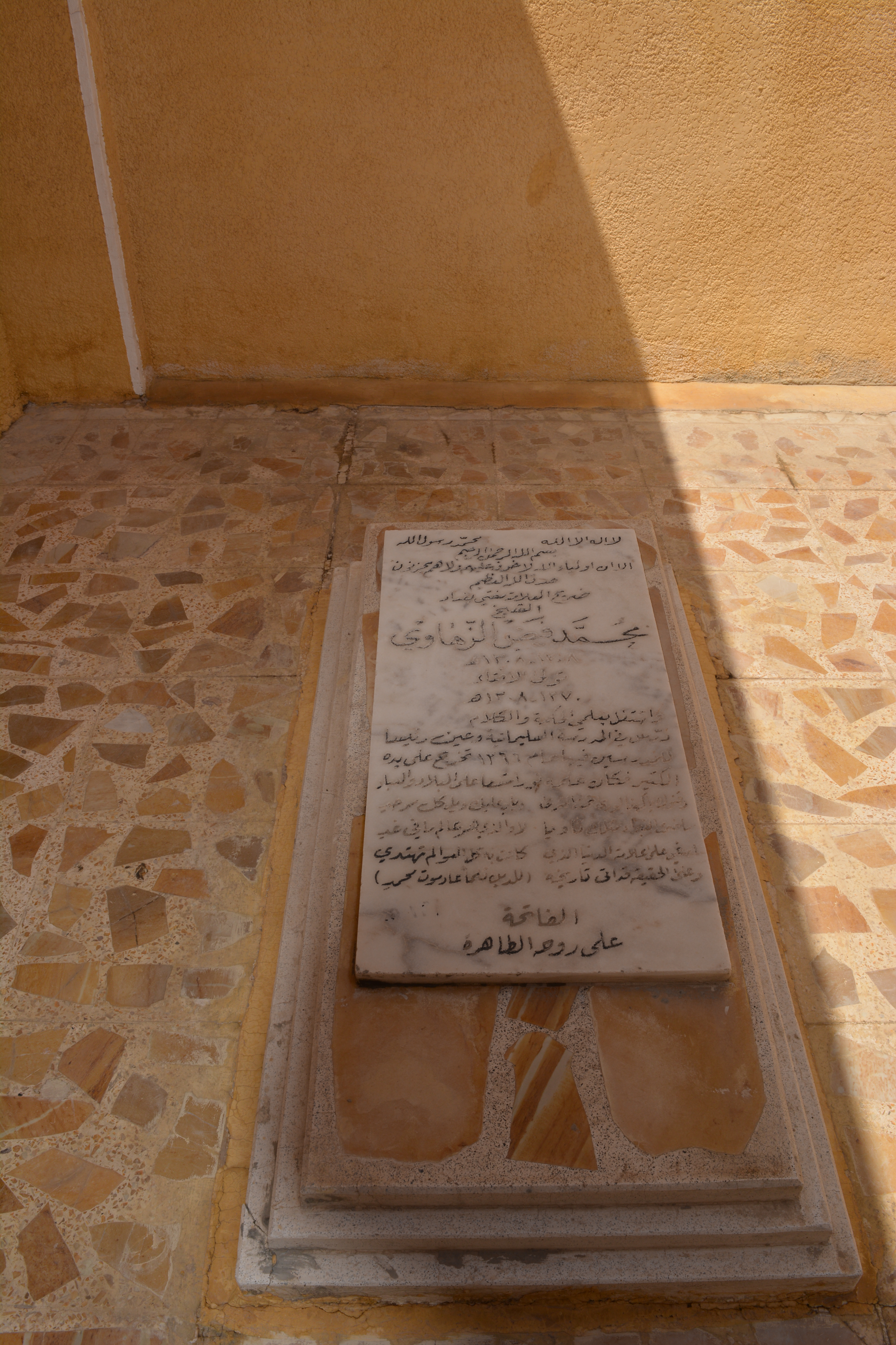 ضريح مفتي بغداد الشيخ محمد فيضي الزهاوي في جامع السليمانية ببغداد والمتوفى بتاريخ 14 ديسمبر 1890